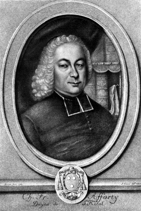 Le chanoine Charles-François Afforty (1706-1786), principal historien de Senlis.